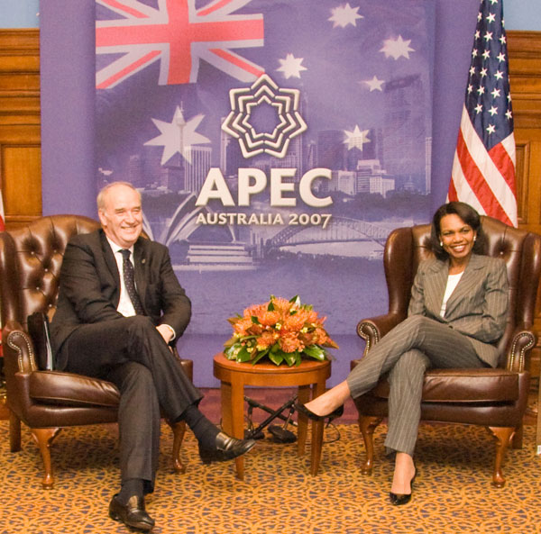 José Antonio Garcia Belaunde and Condoleezza Rice.